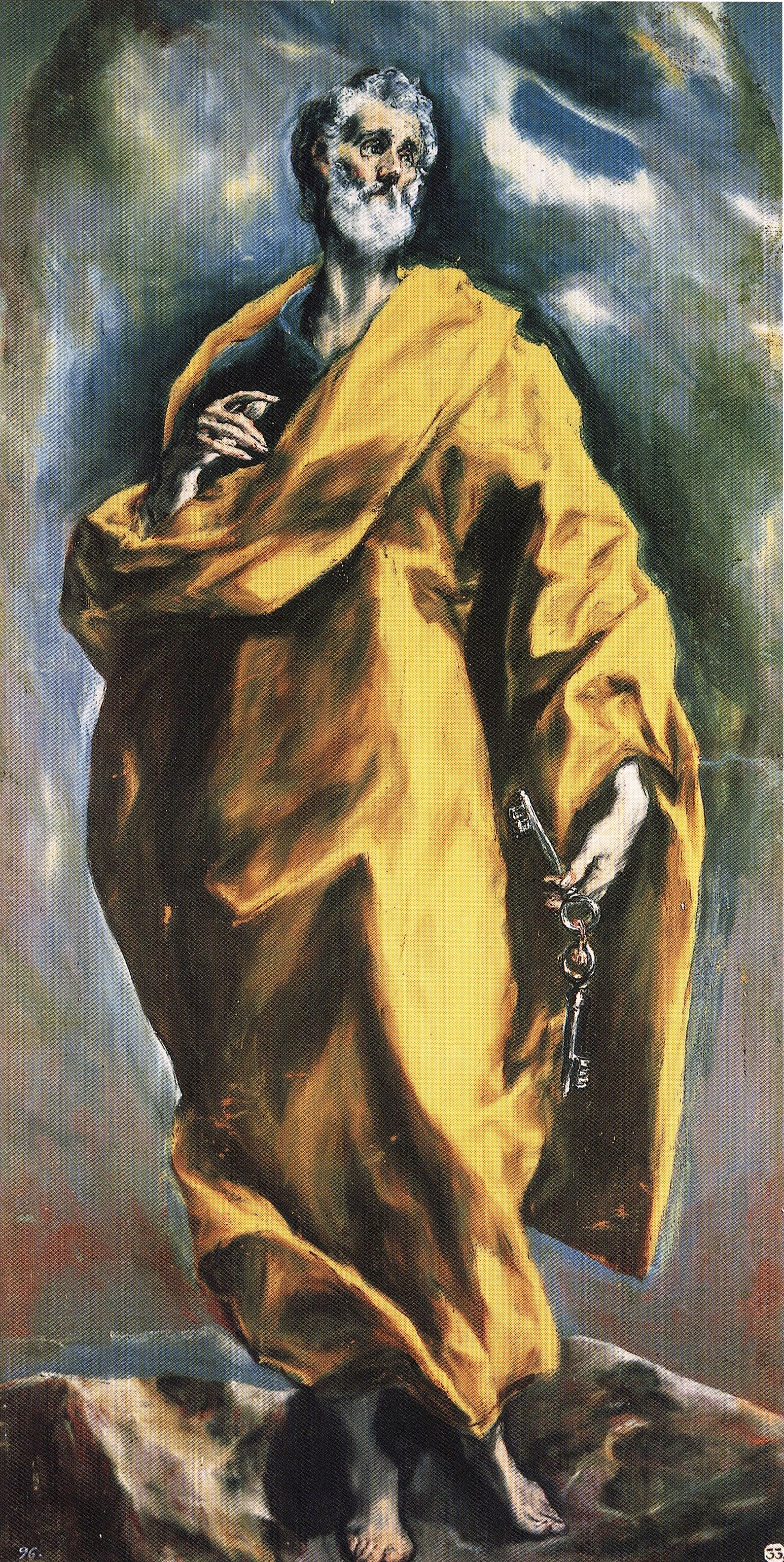 La obra representa al apóstol San Pedro, el primer papa de la Iglesia Católica.